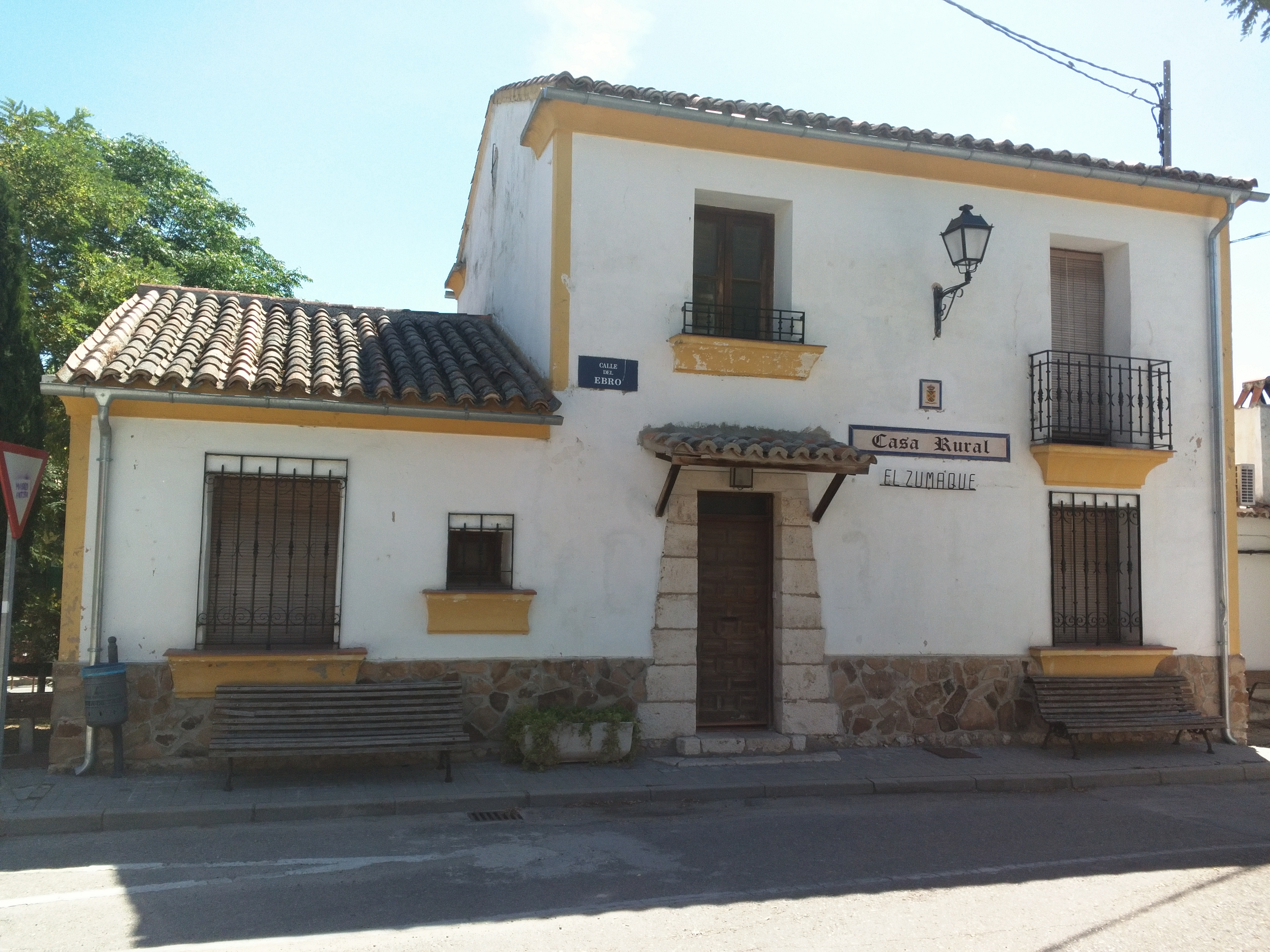 Casa rural El Zumaque en Brea de Tajo